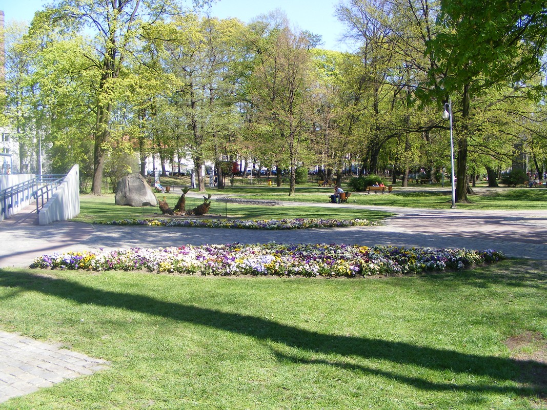 PARK CHOPINA. WCZESNA WIOSNA.